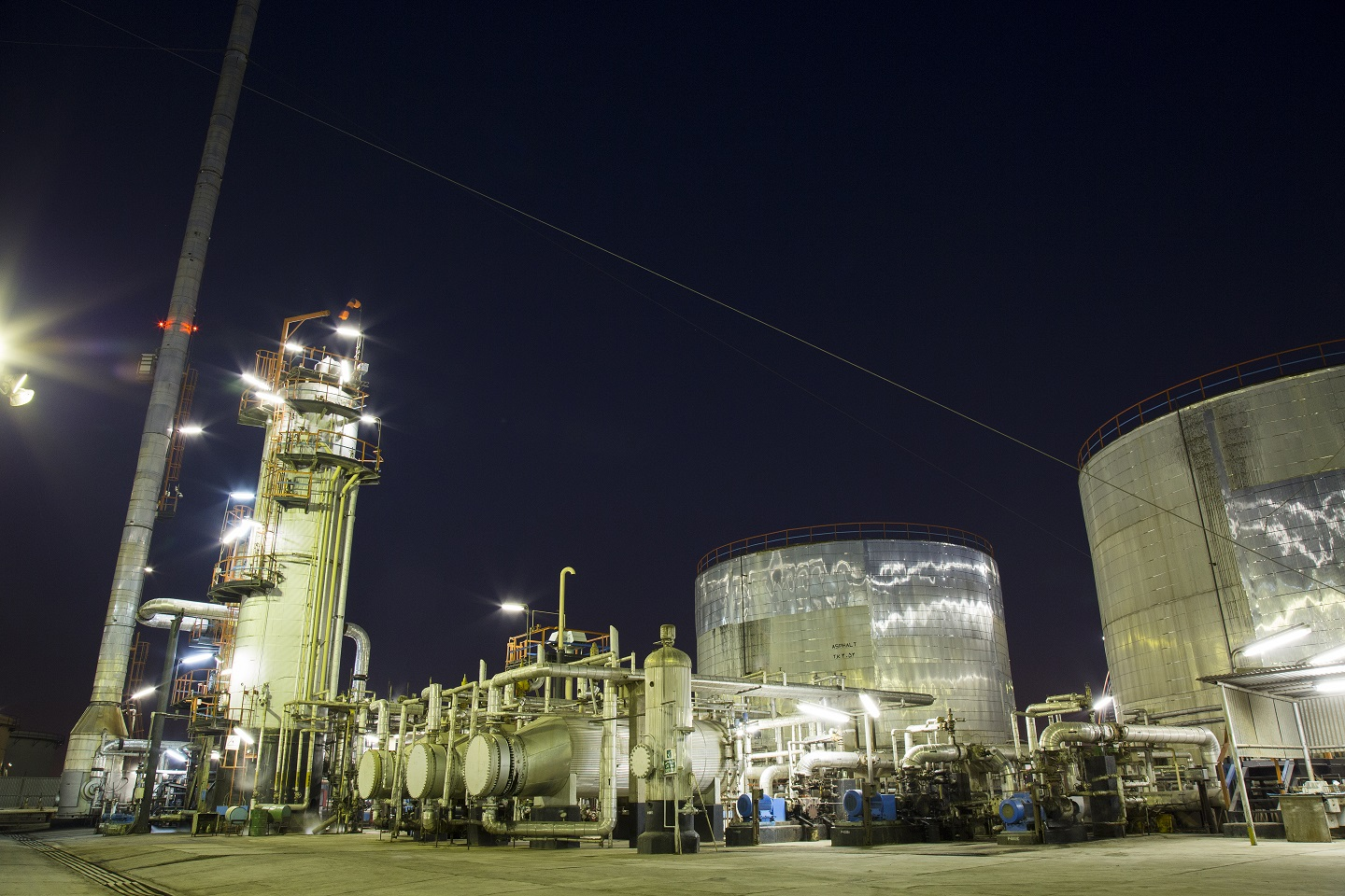 the image shows Jey oil refining co.